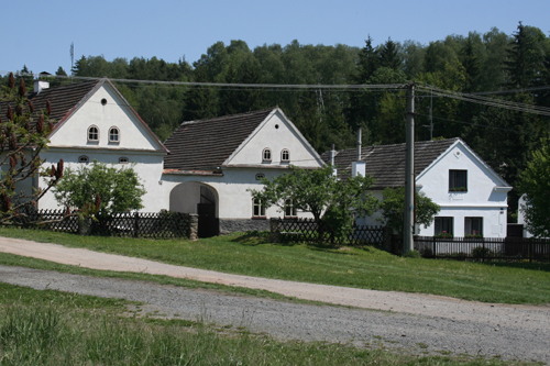 Košetice (část obce Líšťany) v okrese Plzeň-sever, Česká republika